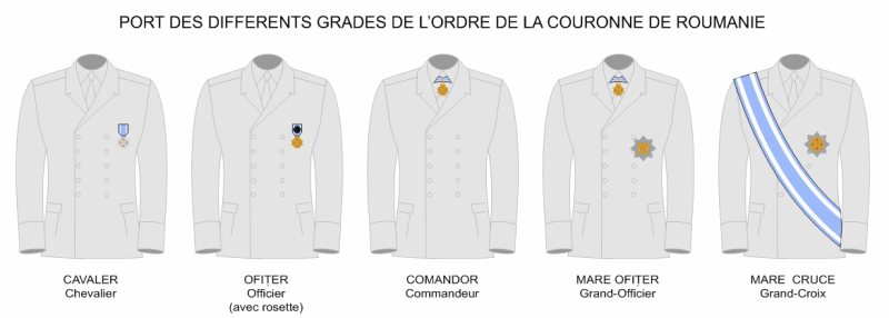 Port des grades de l'Ordre de la Couronne de Roumanie